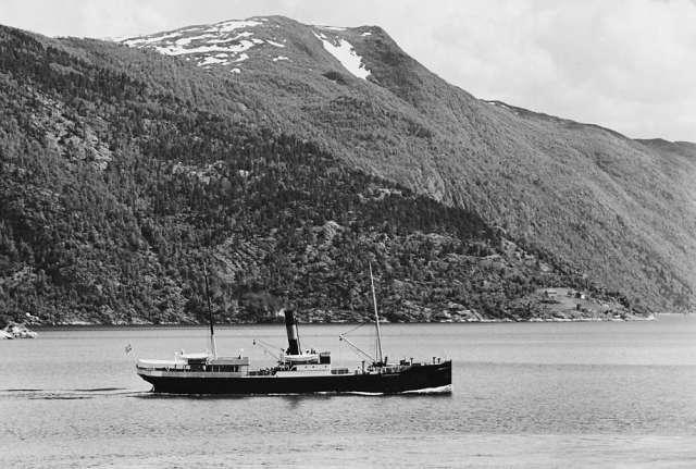 SS Kommandøren leaving Balestrand, Norway.